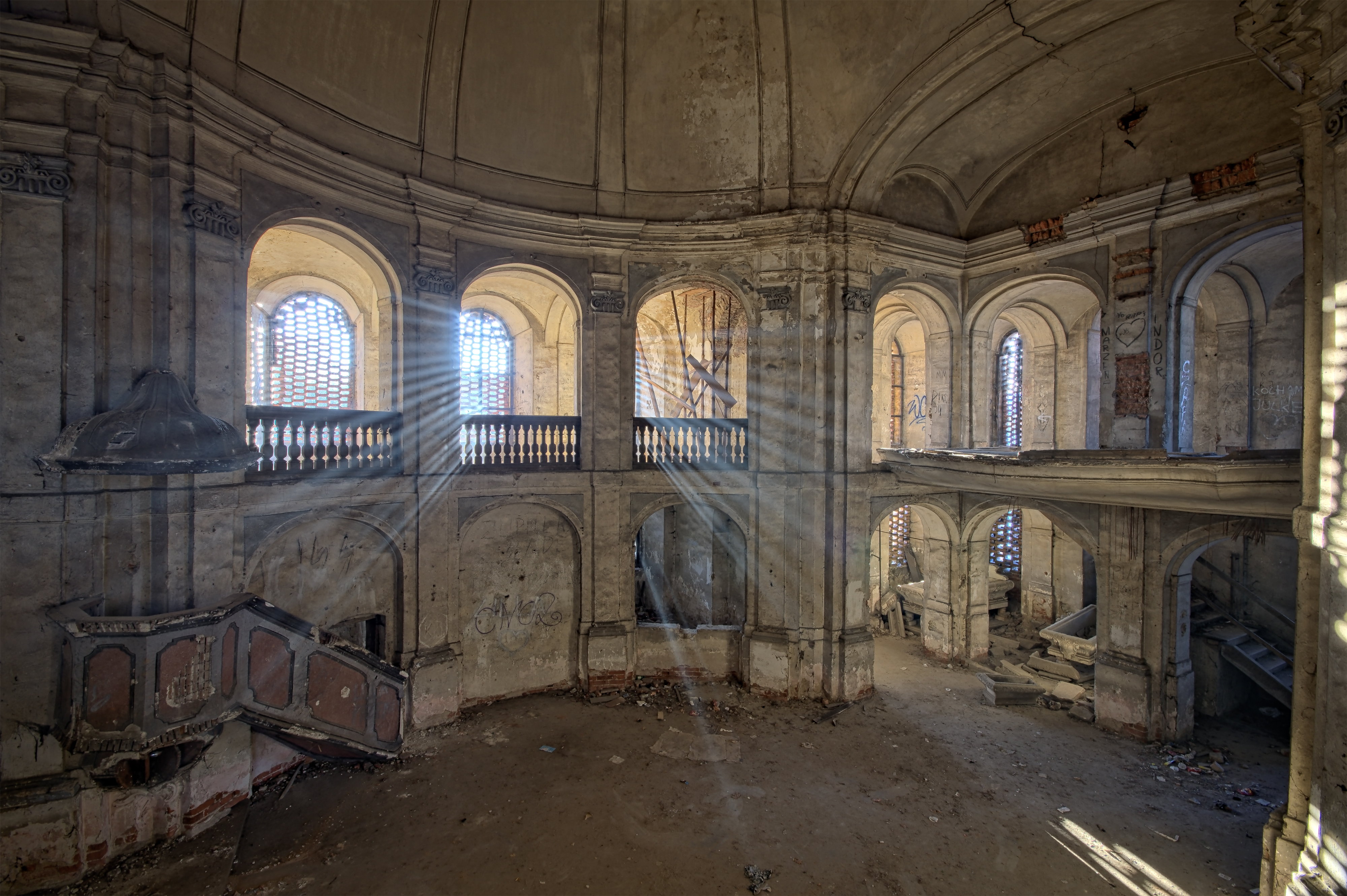 Goszcz, Kościół poewangelicki w Goszczu